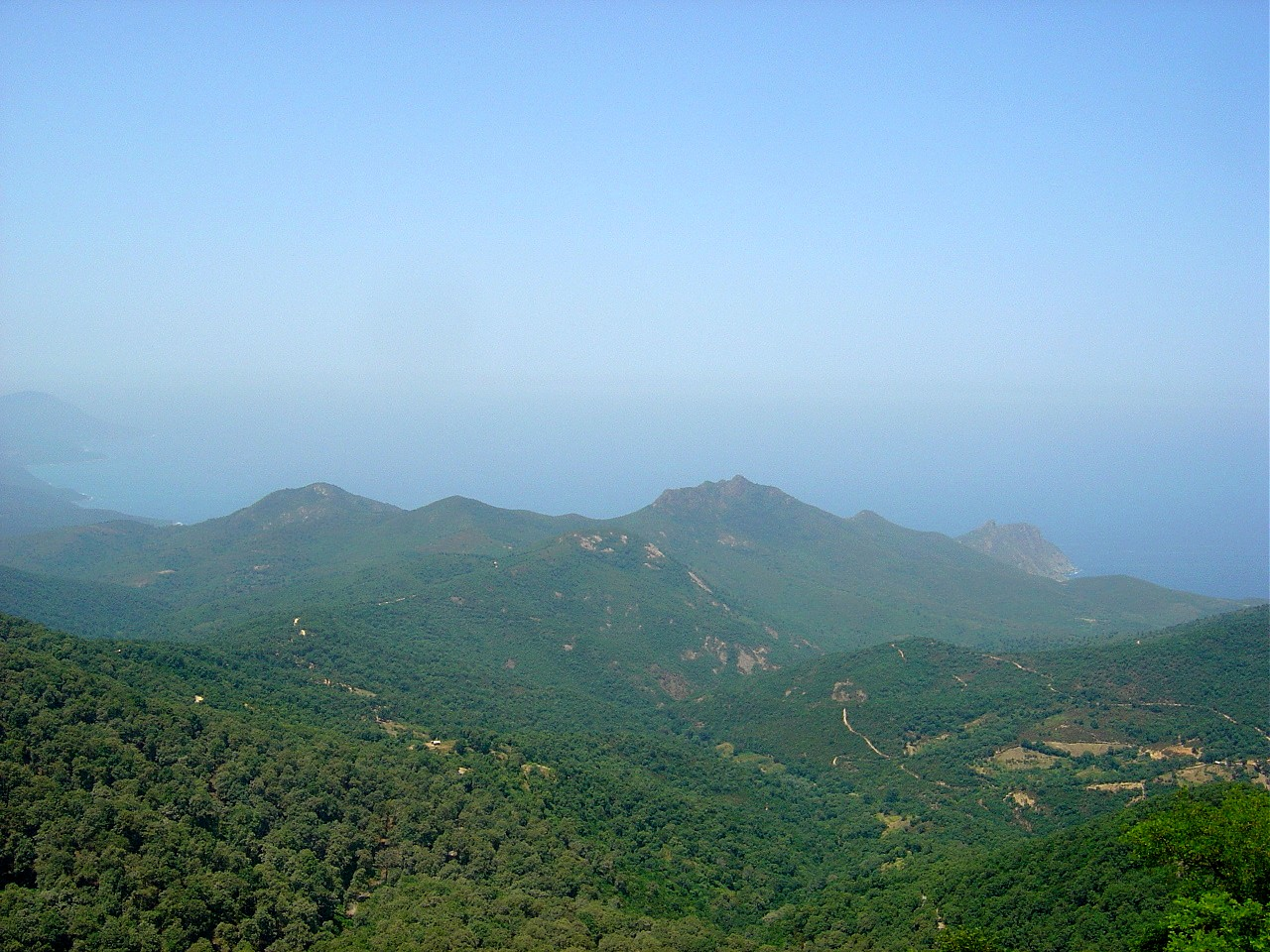 Forêts de Seraïdi à perte de vue. Wilaya d'Annaba, Algérie.